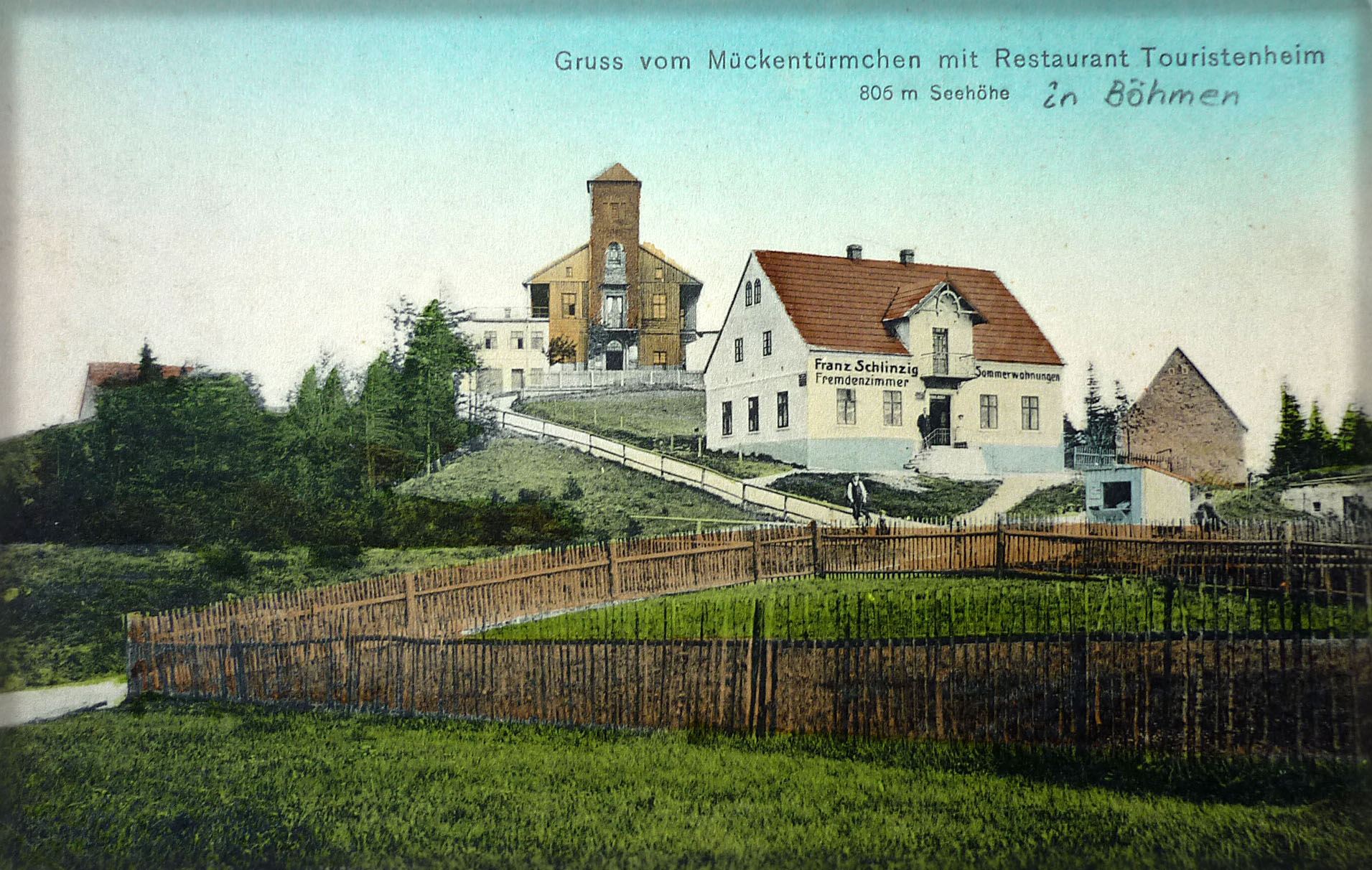 Mückentürmchen bei Graupen im böhmischen Erzgebirge (alte Postkarte)